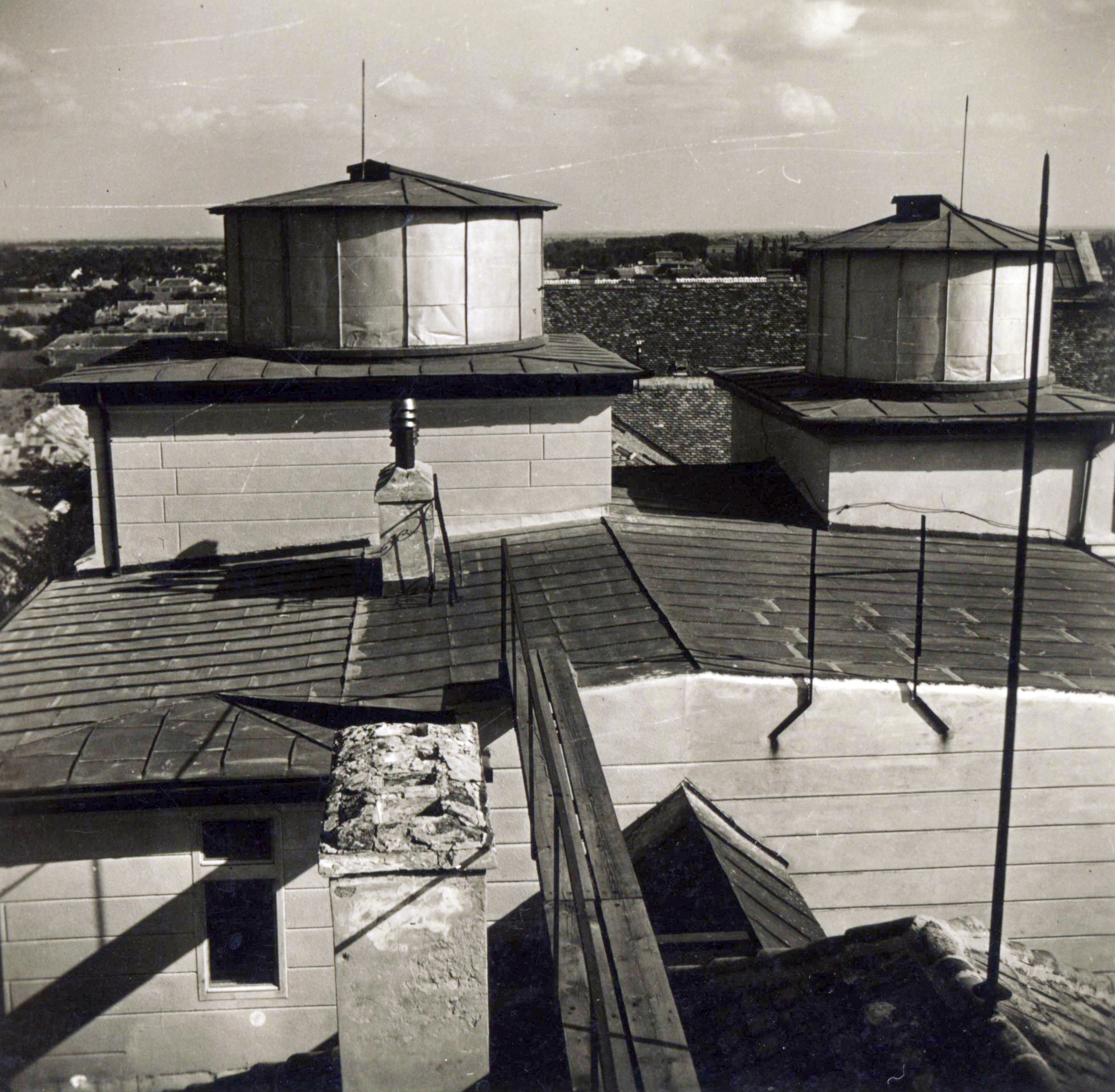 Hunyadi János utca 23-25., az Érseki Főgimnázium (ma Szent István Gimnázium) tetején a Haynald-Obszervatórium (Csillagda) kupolái a meteorológiai megfigyelő állomástól nézve. Location: Hungary, Kalocsa Title: Hunyadi János utca 23-25., az Érseki Főgimnázium (ma Szent István Gimnázium) tetején a Haynald-Obszervatórium (Csillagda) kupolái a meteorológiai megfigyelő állomástól nézve.